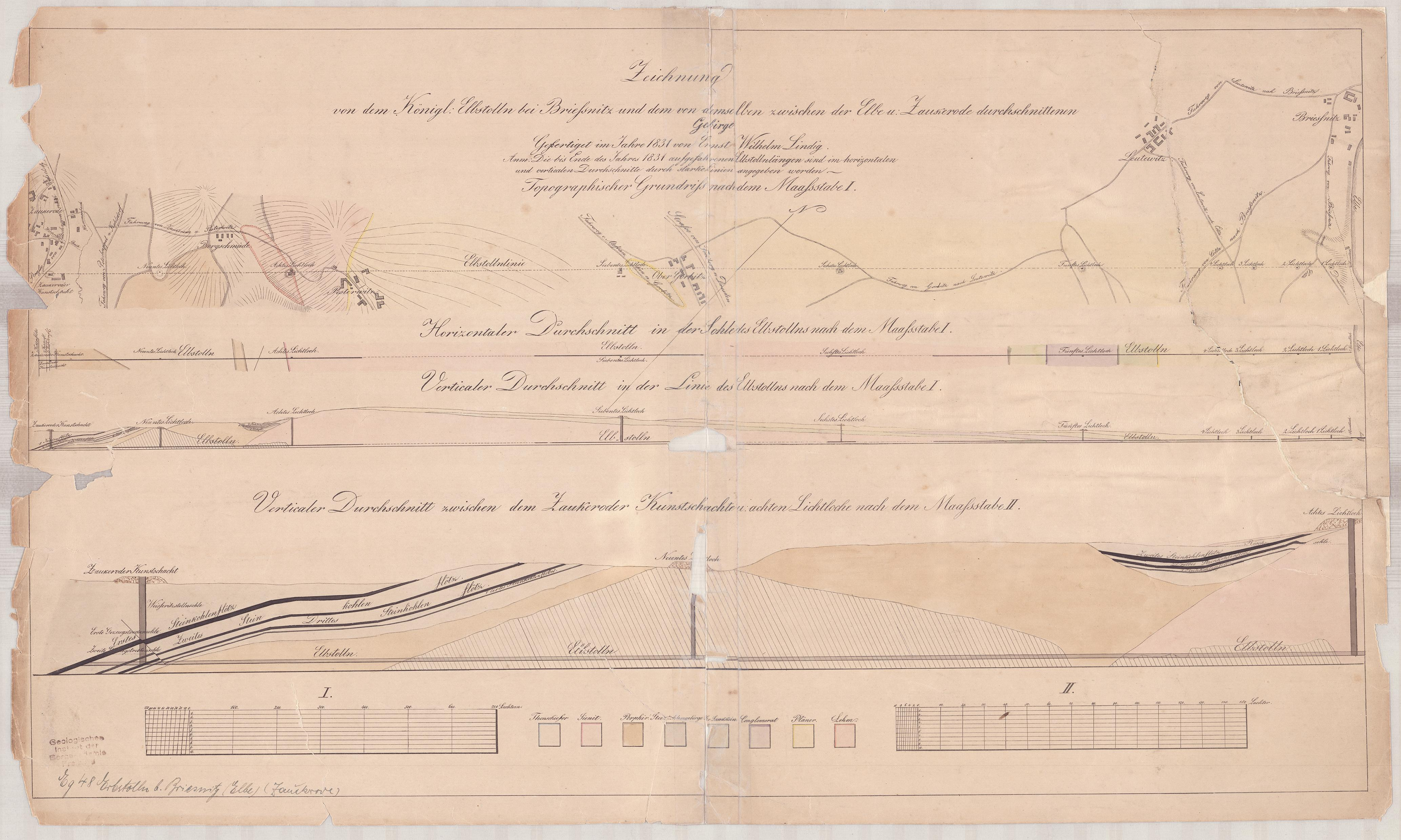 Zeichnung von dem Königlichen Elbstolln bei Brießnitz und demselben zwischen der Elbe und Zaukerode durchschnittenen Gebirge Gefertigt im Jahre 1831 von Ernst Wilhelm Lindig Anmerkung: Die bis Ende des Jahres 1831 aufgefahrenen Elbstollnlängen sind im horizontalen und verticalen Durchschnitte durch starke Linien angegeben worden. Topographischer Grundriß nach dem Maaßstabe I.